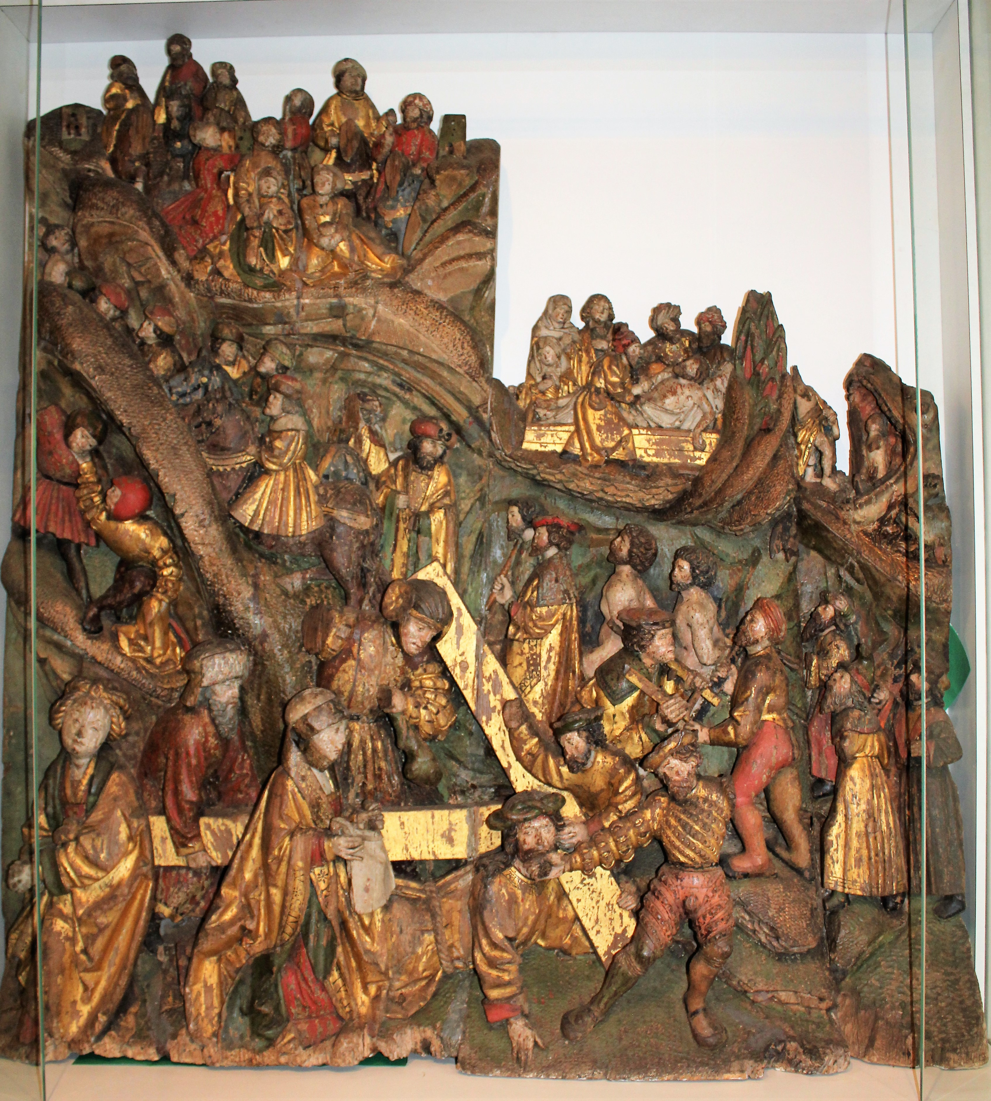 Altarfragment der Kirche in Holtgaste, heute im Heimatmuseum Rheiderland, Weener, Niedersachsen, Deutschland